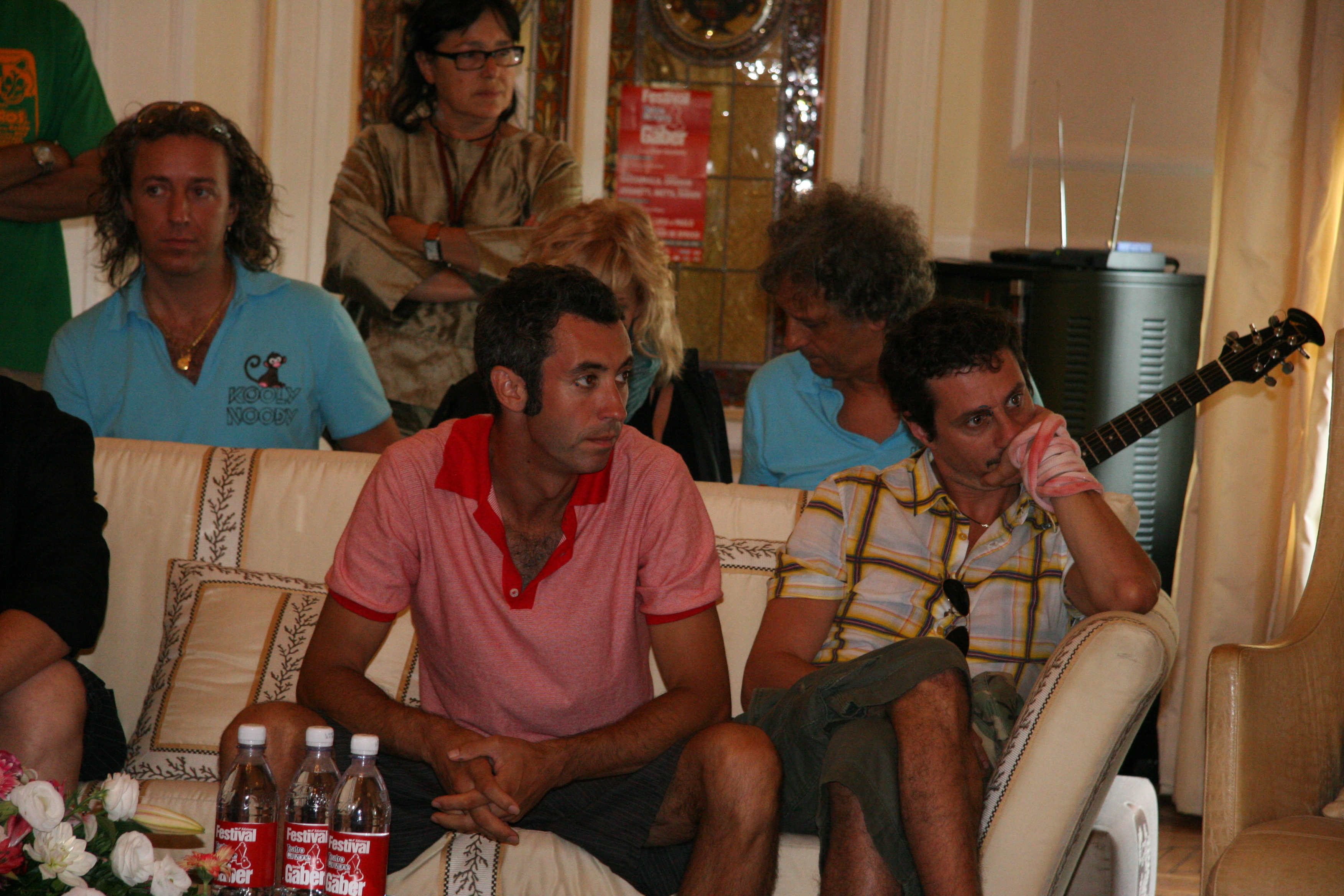 Luca e Paolo al Festival Gaber 2008.